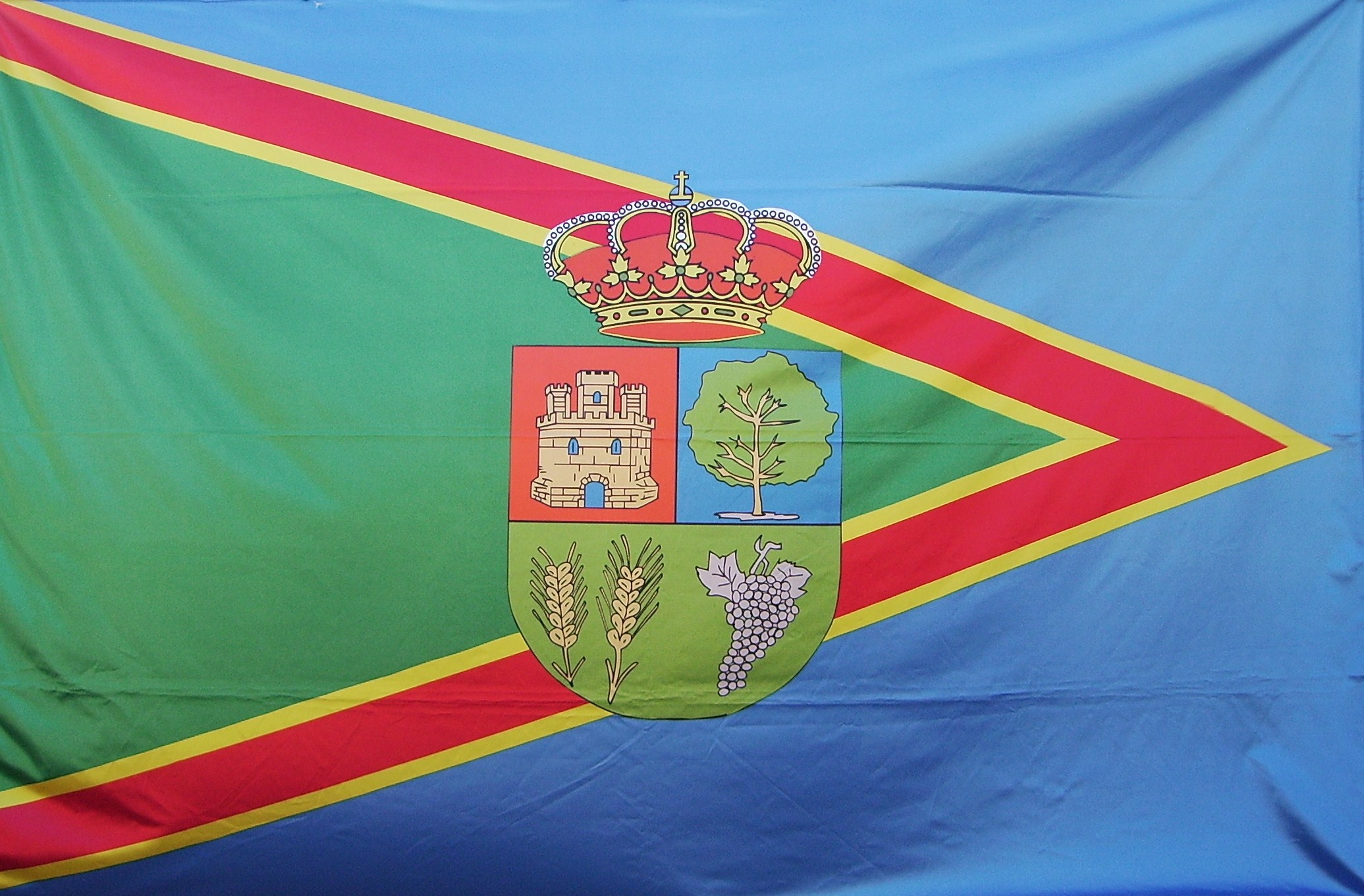 Fotografía de la Bandera de Solduengo